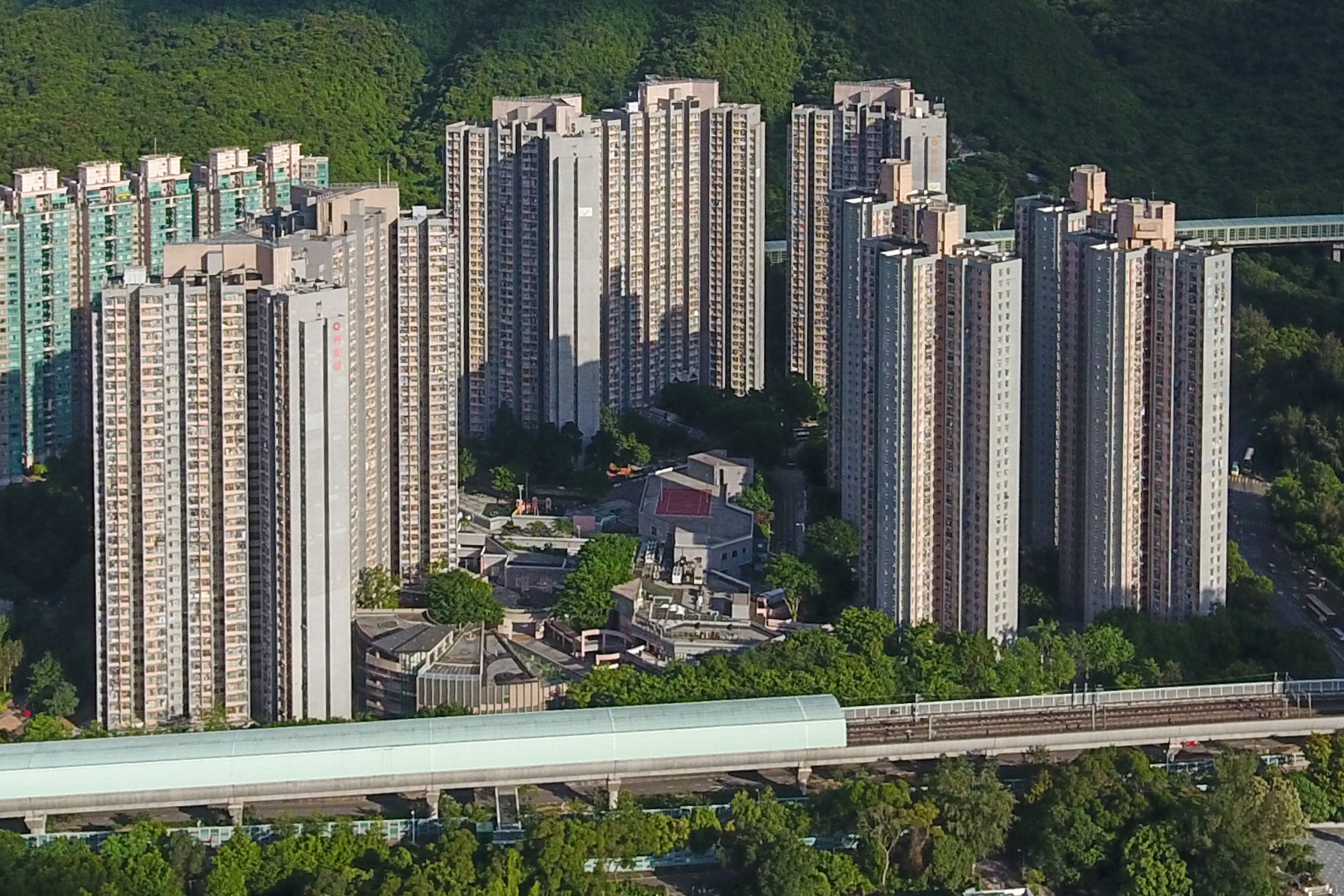 Lee On Estate overview